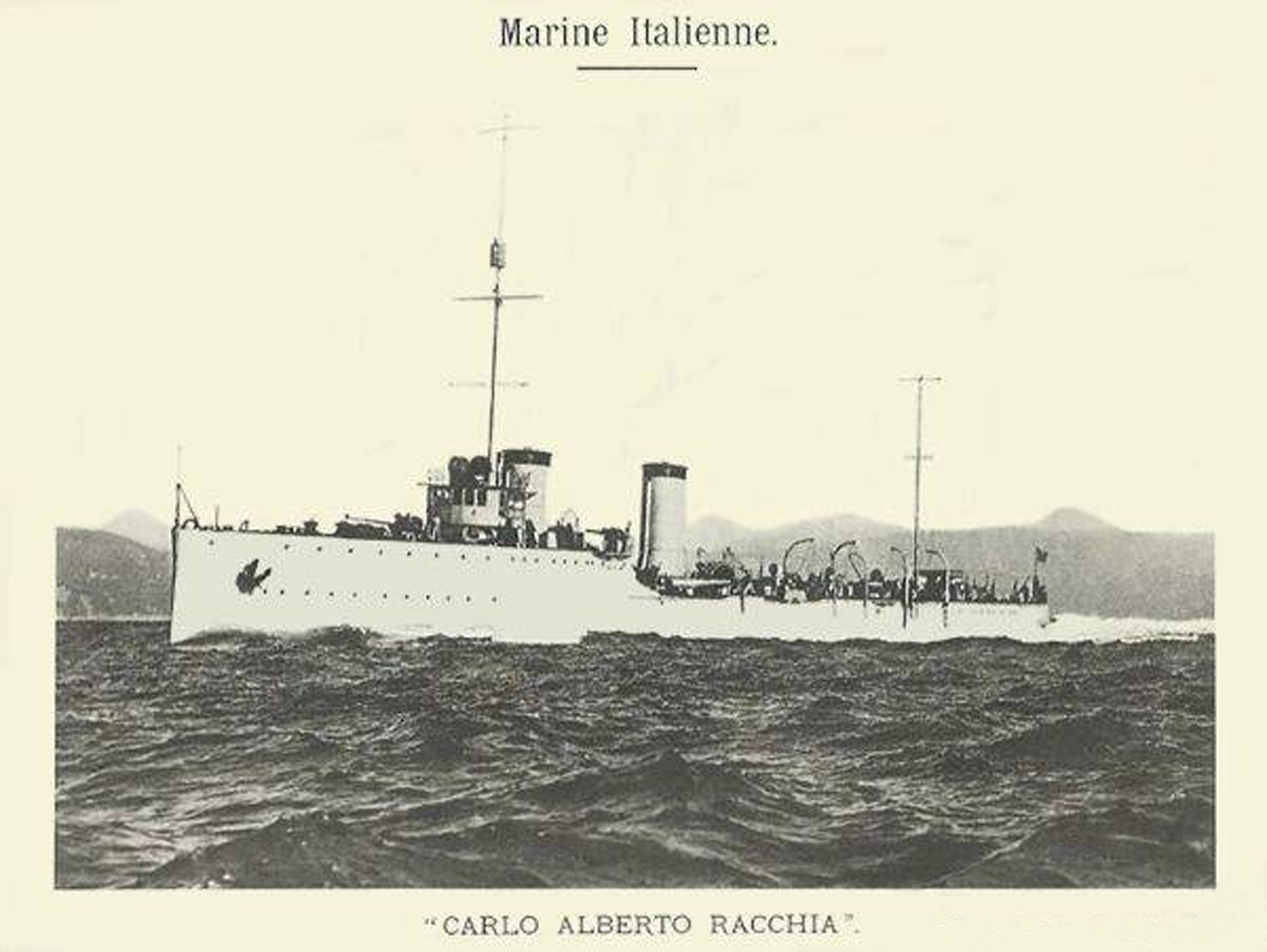 Эскадренный миноносец (эсминец) "Карло Альберто Раккиа"